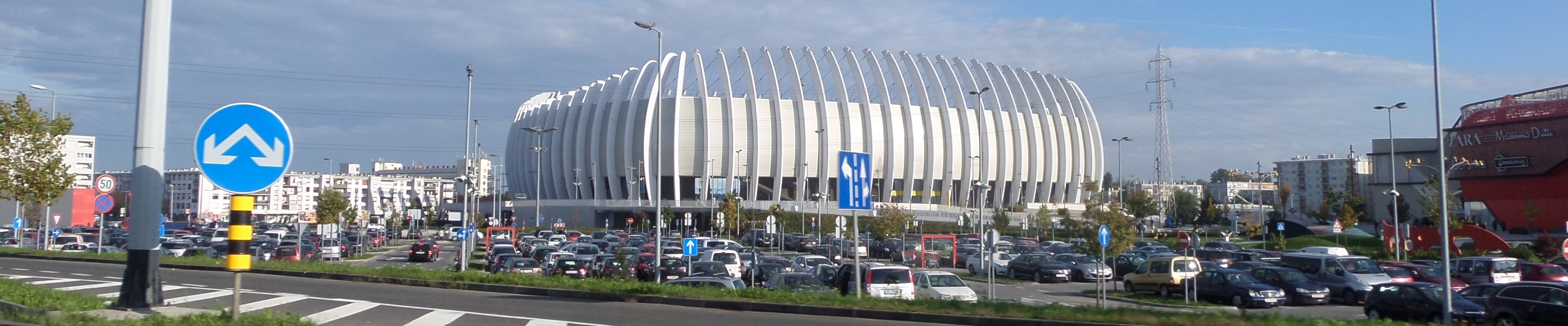 18.10..2015. _ Arena . Zagreb